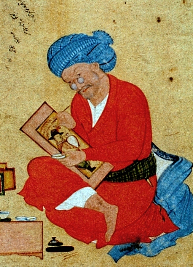 Mu'in._Portrait_of_Riza-i-Abbasi._1673._Princeton_University..jpg